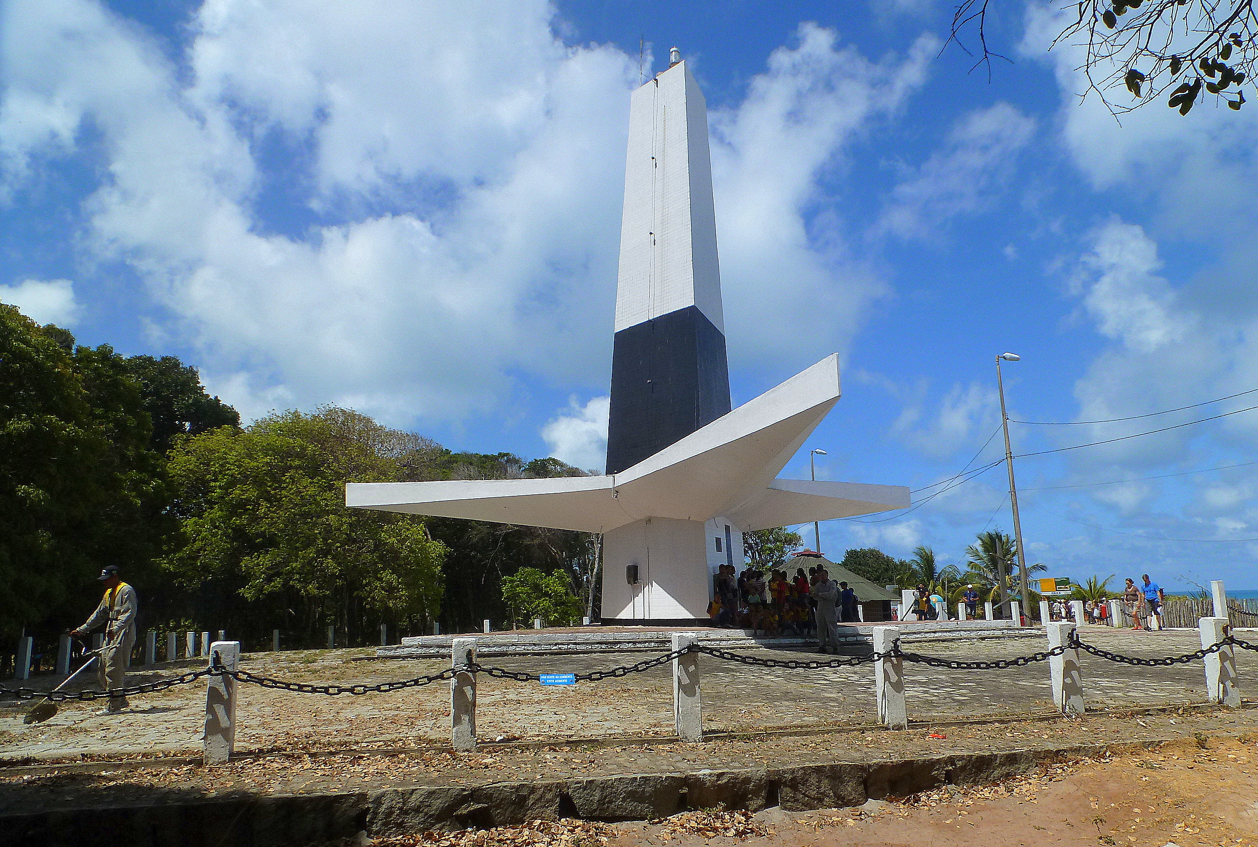 Farol do Cabo Branco